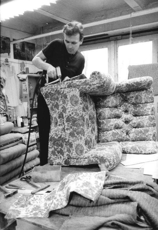 Berlin, Polsterei, Montage ADN-ZB Grimm 8.1.86-gri-Berlin: Polstermöbel aus der Pappelallee- Sessel, Chouchgarnituren, Liegesofas und Betten werden von den Mitgliedern der PGH Heimgestaltung in der Pappelallee, Stadtbezirk Prenslauer Berg, angefertigt. Auch Garantieleistungen und Reparaturen an Polstermöbel werden dort ausgeführt. Die Modelle, die neuangefertigt werden, sind in der Verkaufseinrichtung der PGH in der Dimitroffstr. 145 ausgestellt. Neben Einzelanfertigungen führen die Polsterer auch Reparaturen an der Bestuhlung des Palastes der Republik durch. Igmar Kowitz befestigt einen Volan an einem Backensessel.